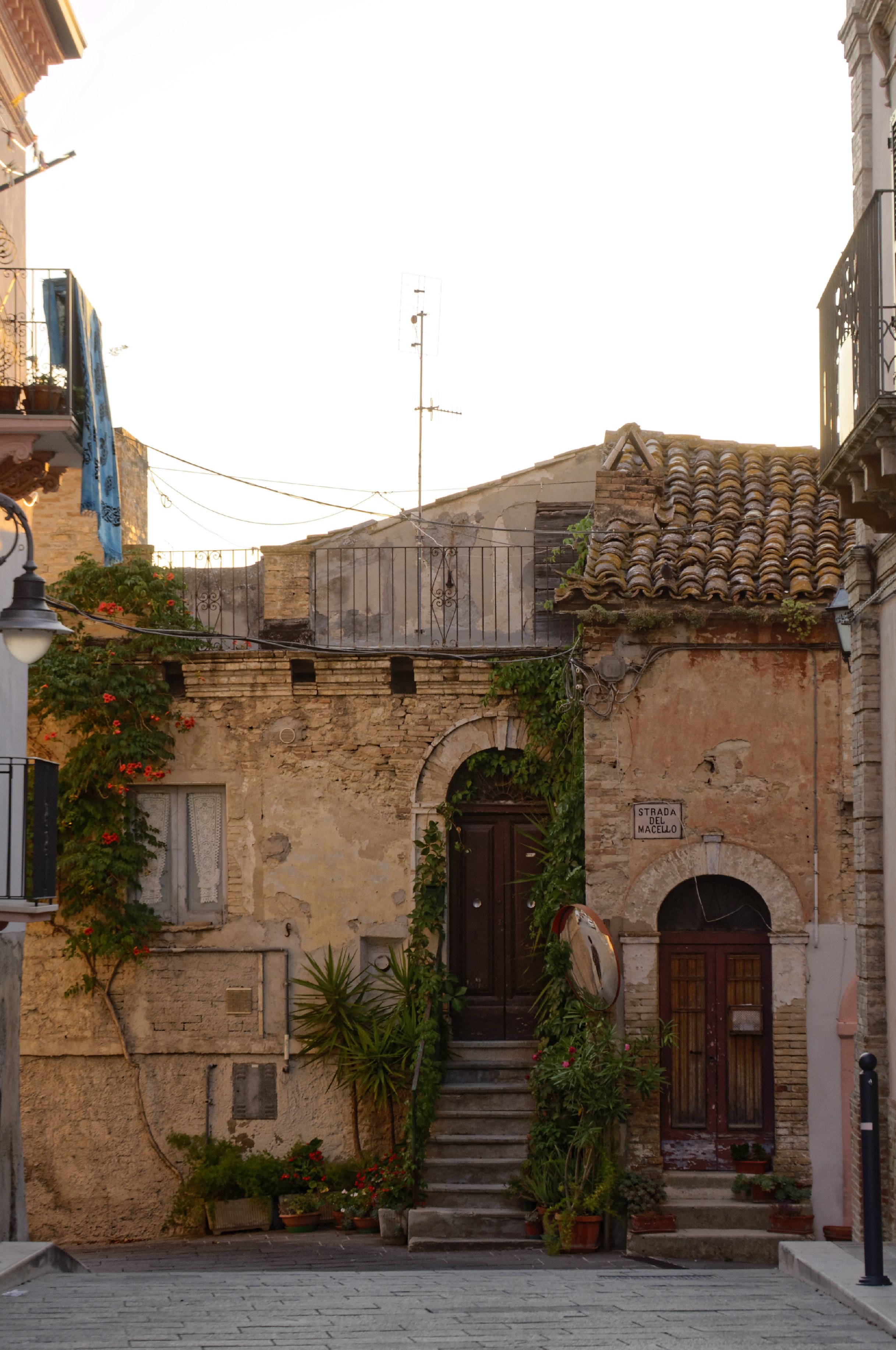 San Vito Chietino 2015 Dieses Foto entstand in Zusammenarbeit mit Stadtbesichtigungen.de Die Seiten Stadtbesichtigungen.de, der dazugehörige Reise Blog sowie die Facebookseite: Stadtbesichtigungen Rom dürfen dieses Bild für Ihre Veröffentlichungen ohne den Hinweis auf Wikipedia, Commons bzw der Lizenz verwenden. Die Verantwortlichen habe von mir (Ra Boe) die Originaldaten zur freien Verfügung übermittelt bekommen.